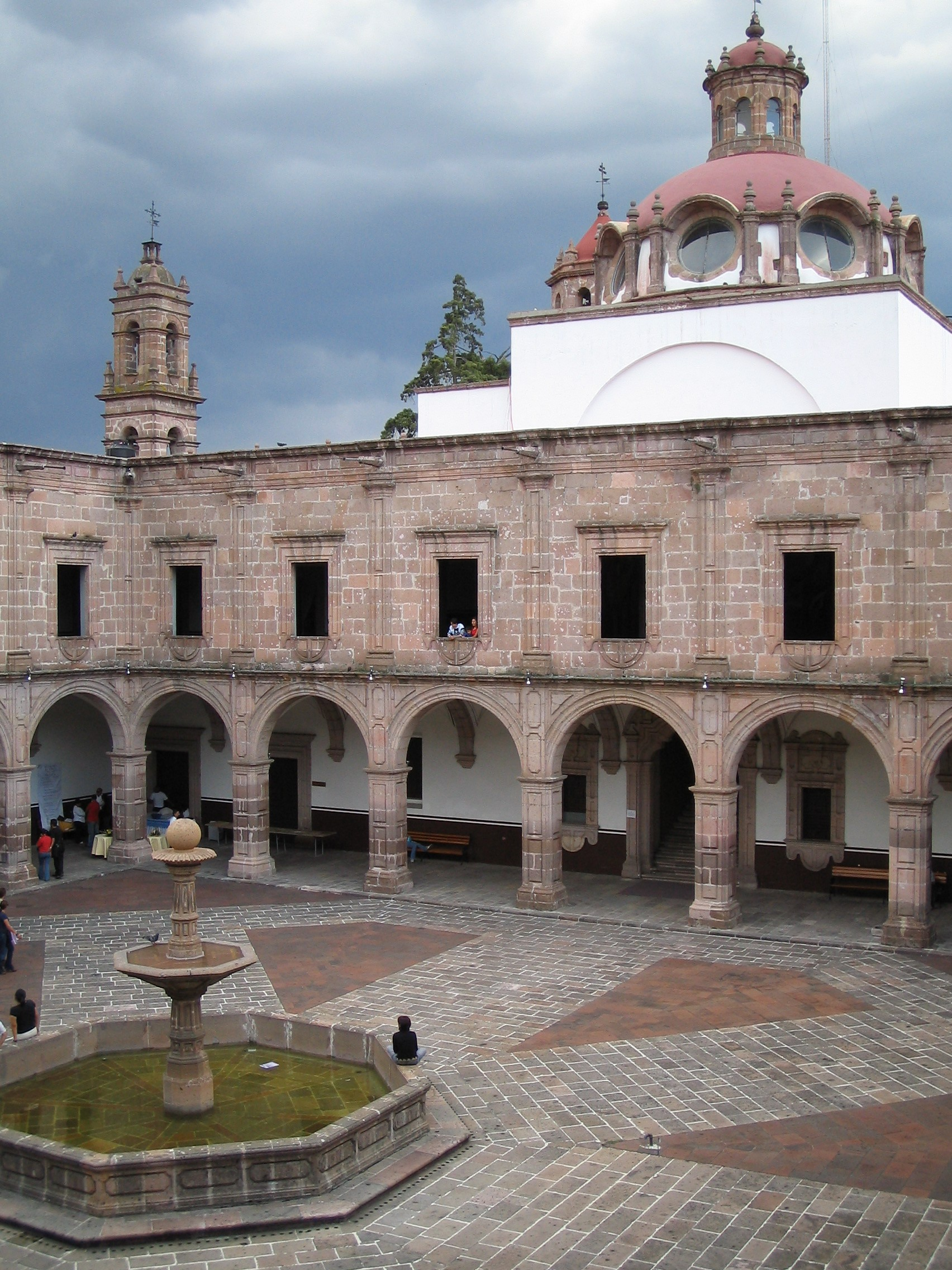 Palacio Clavijero en Morelia, Michoacan, Mexico.